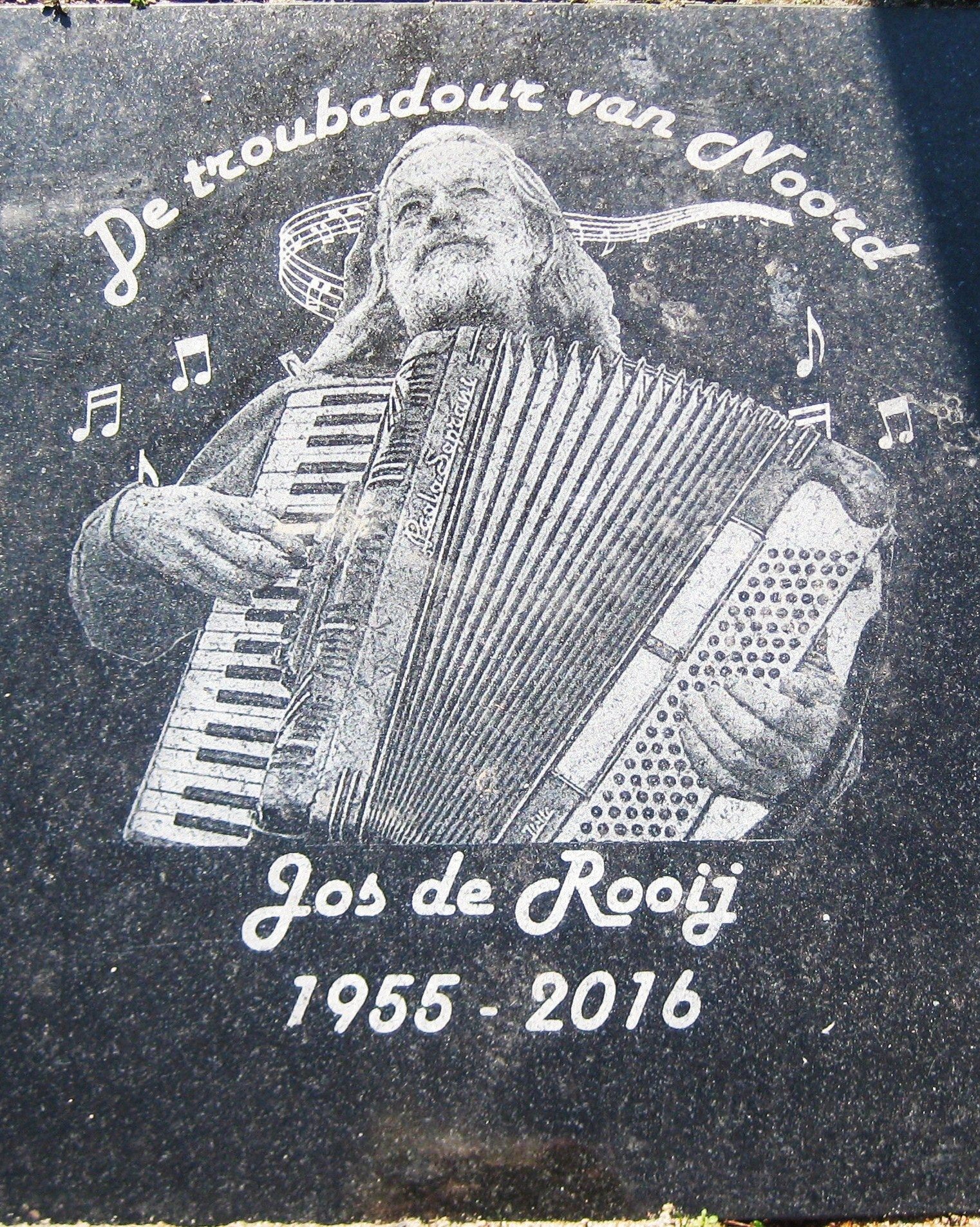 Plaquette ter nagedachtenis van Jos de Rooij op het Mosveld in Amsterdam-Noord 2016.